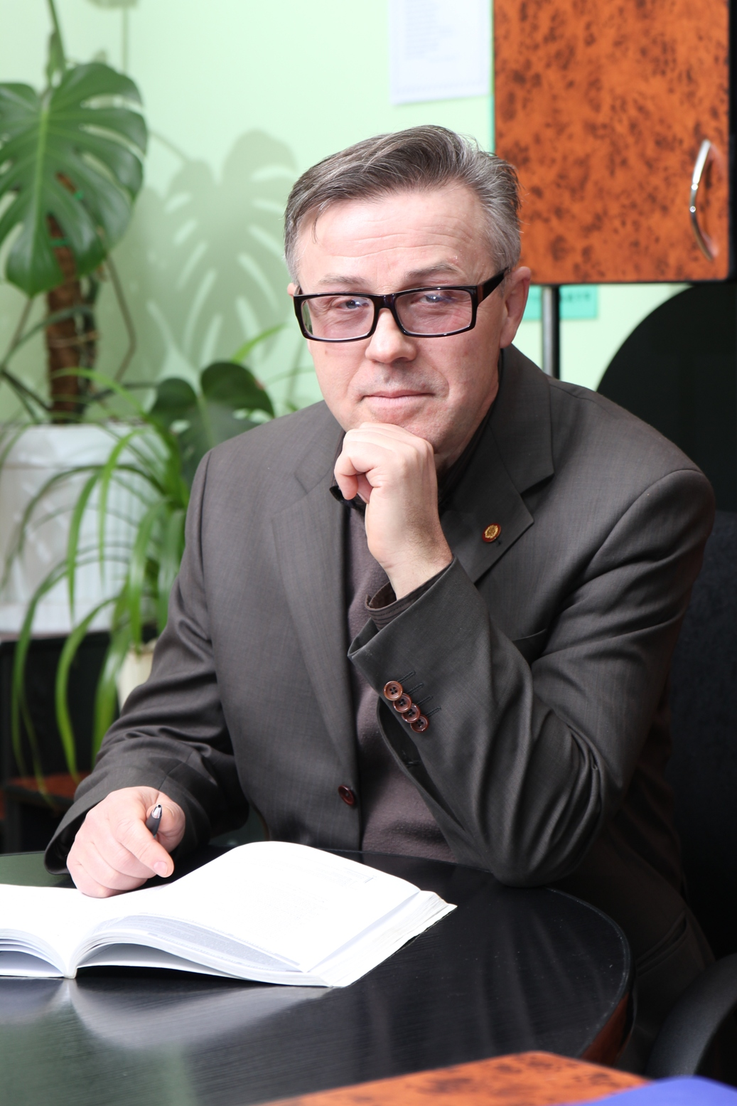 Щукін Володимир Володимирович